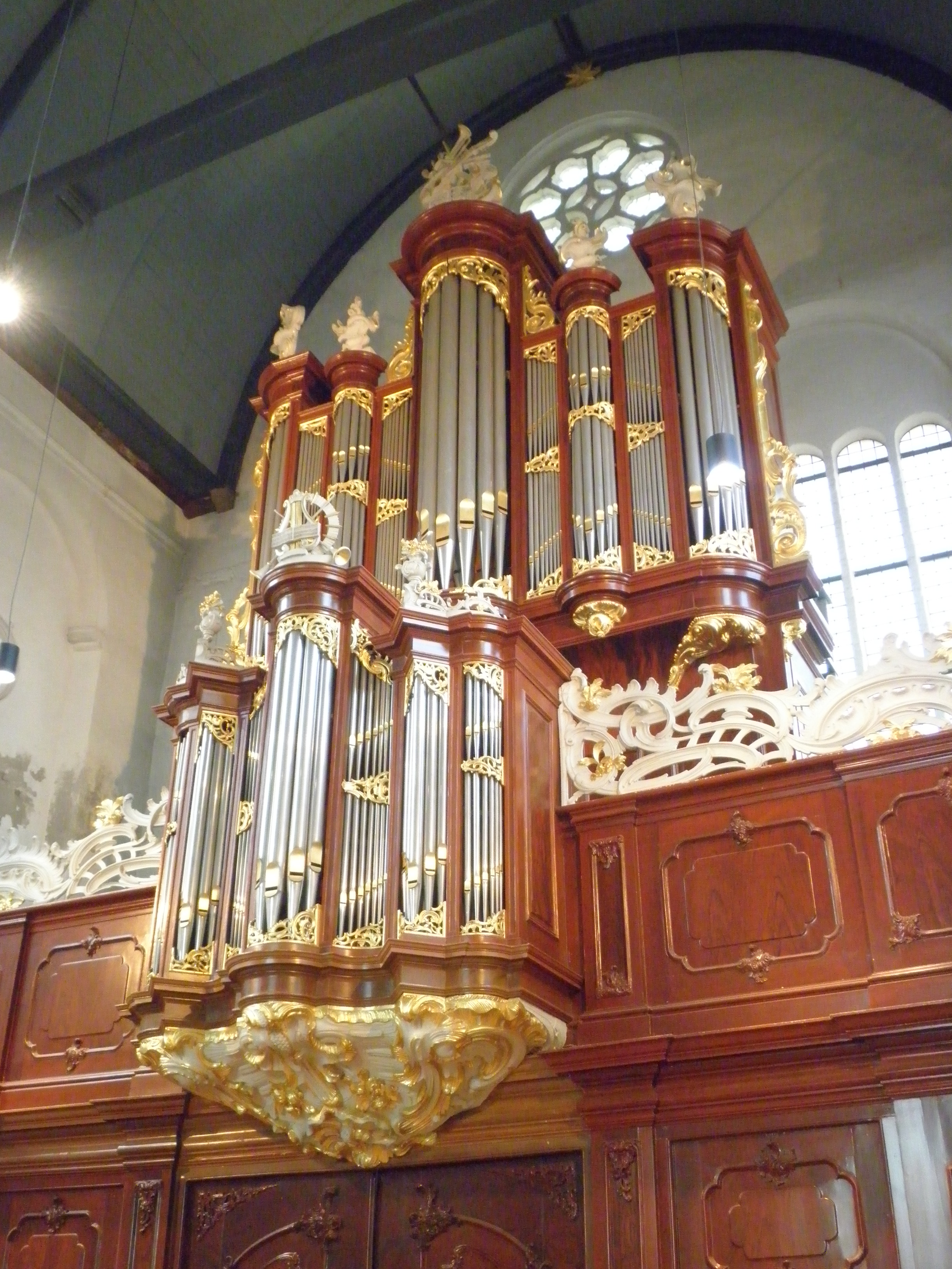 Orgel van de Oosterkerk in Hoorn.